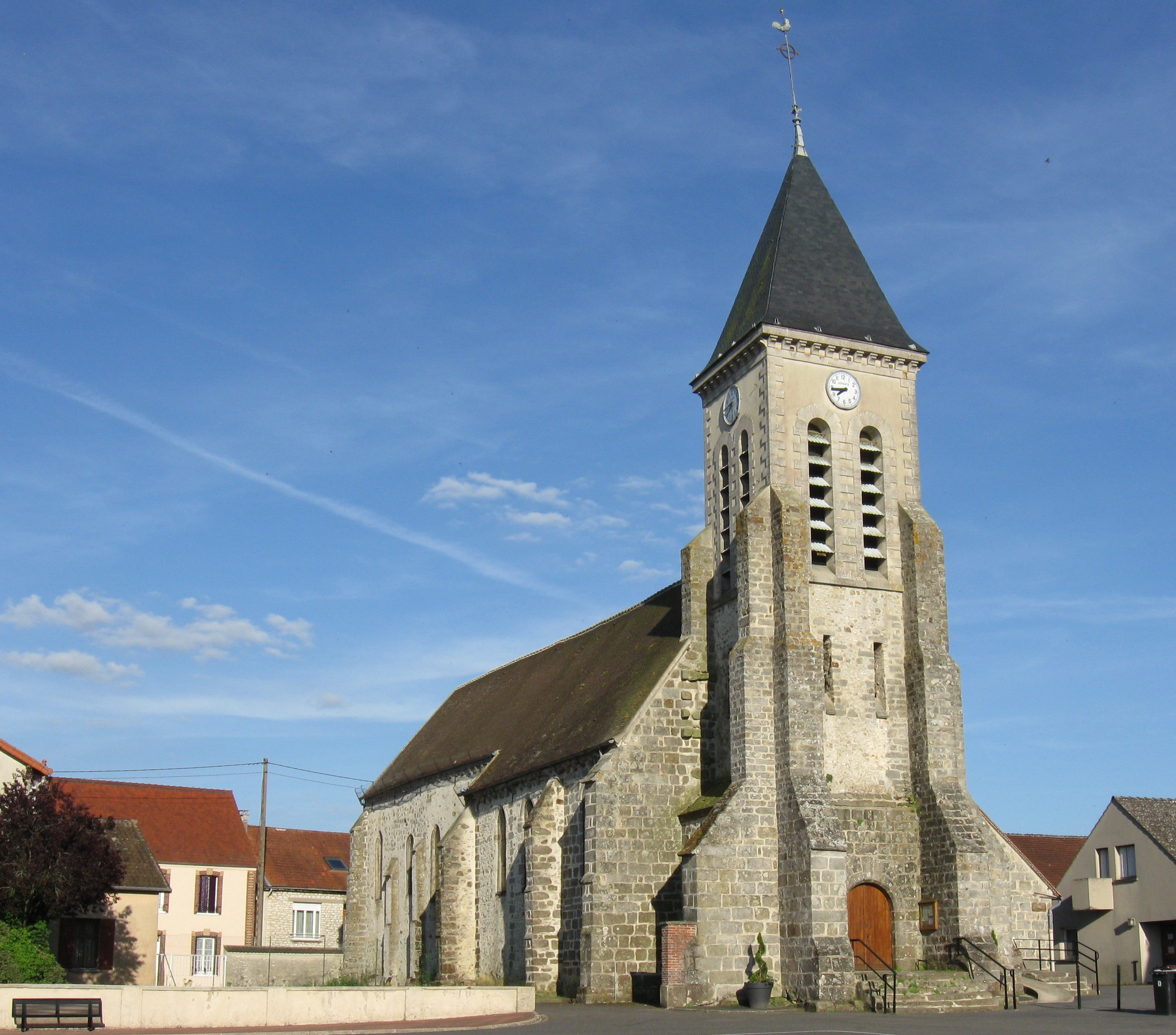 Église Saint-Georges de Villiers-Saint-Georges. (Seine-et-Marne, région Île-de-France).